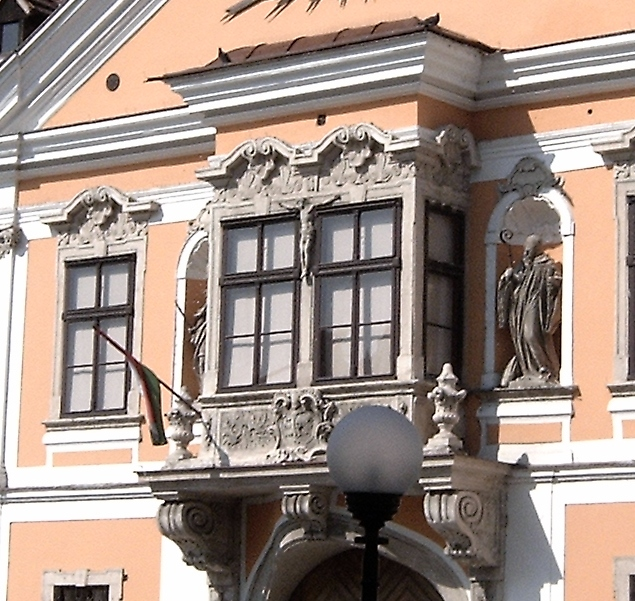 A győri Apátúr-ház (Xántus János Múzeum épülete) zárt erkélye